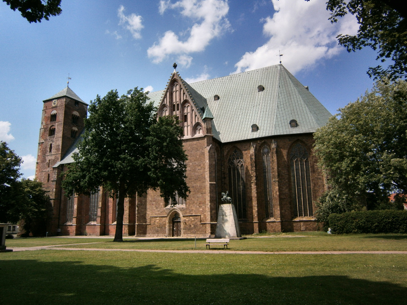 Verden cathedral